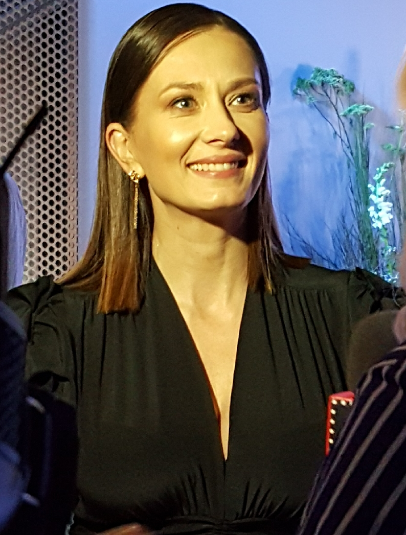 Polska aktorka Anita Sokołowska w 2019 roku.